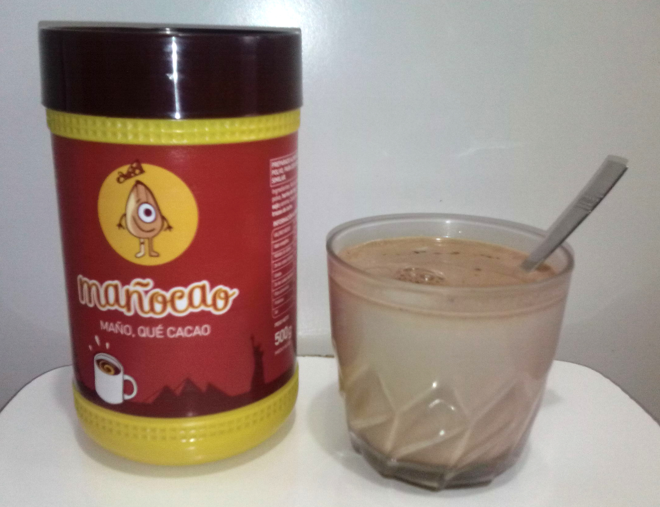 Aragonés: Vaso y bote de Mañocao